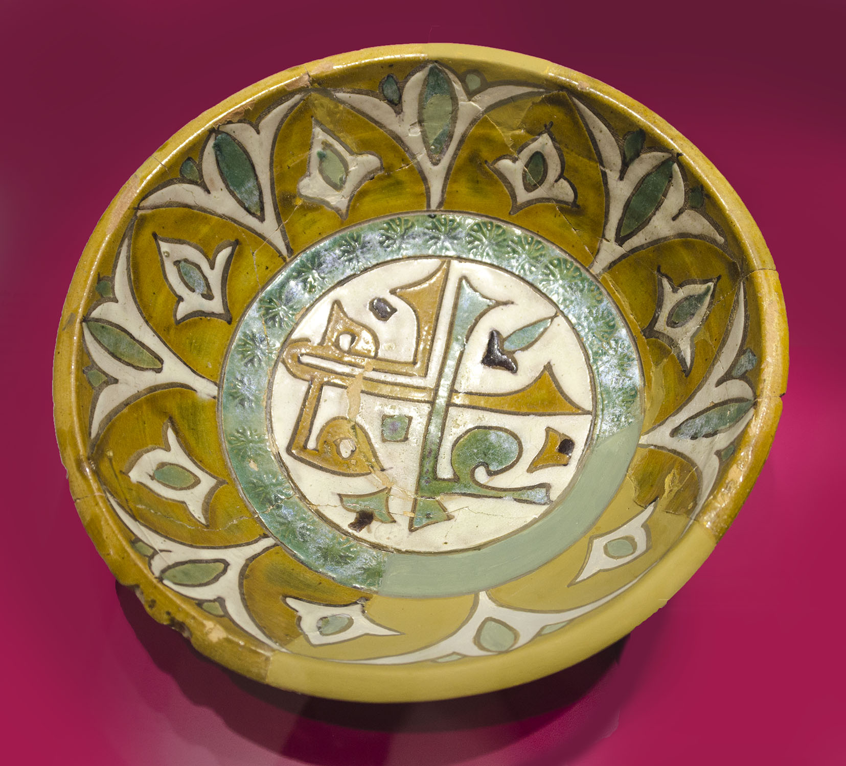 Está datado en la segunda mitad del siglo XI. El epigrama signfica "salud". Se decoró con la técnica de cuerda seca.